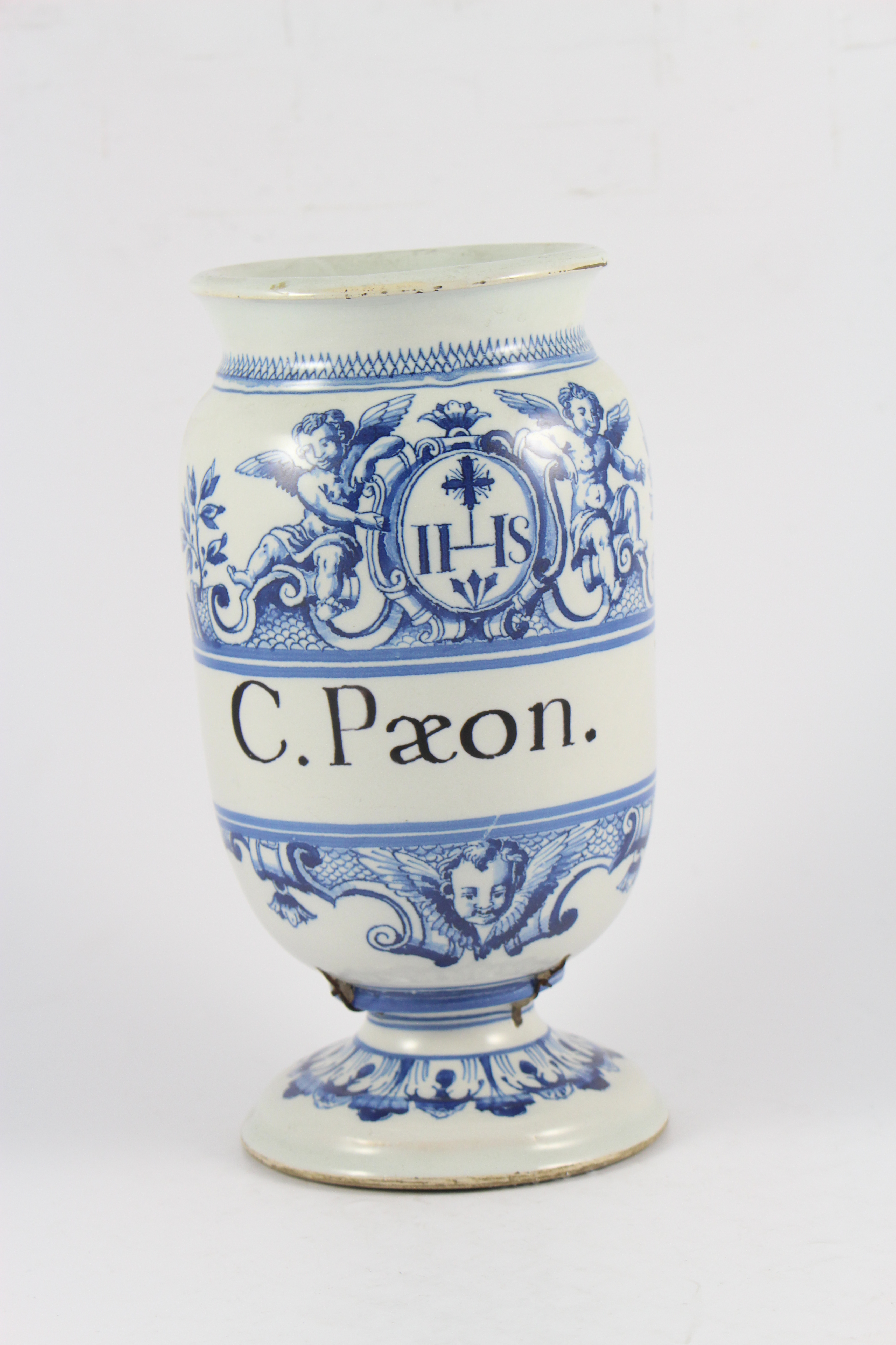 Conserve paeoniae (pivoine) - pot canon